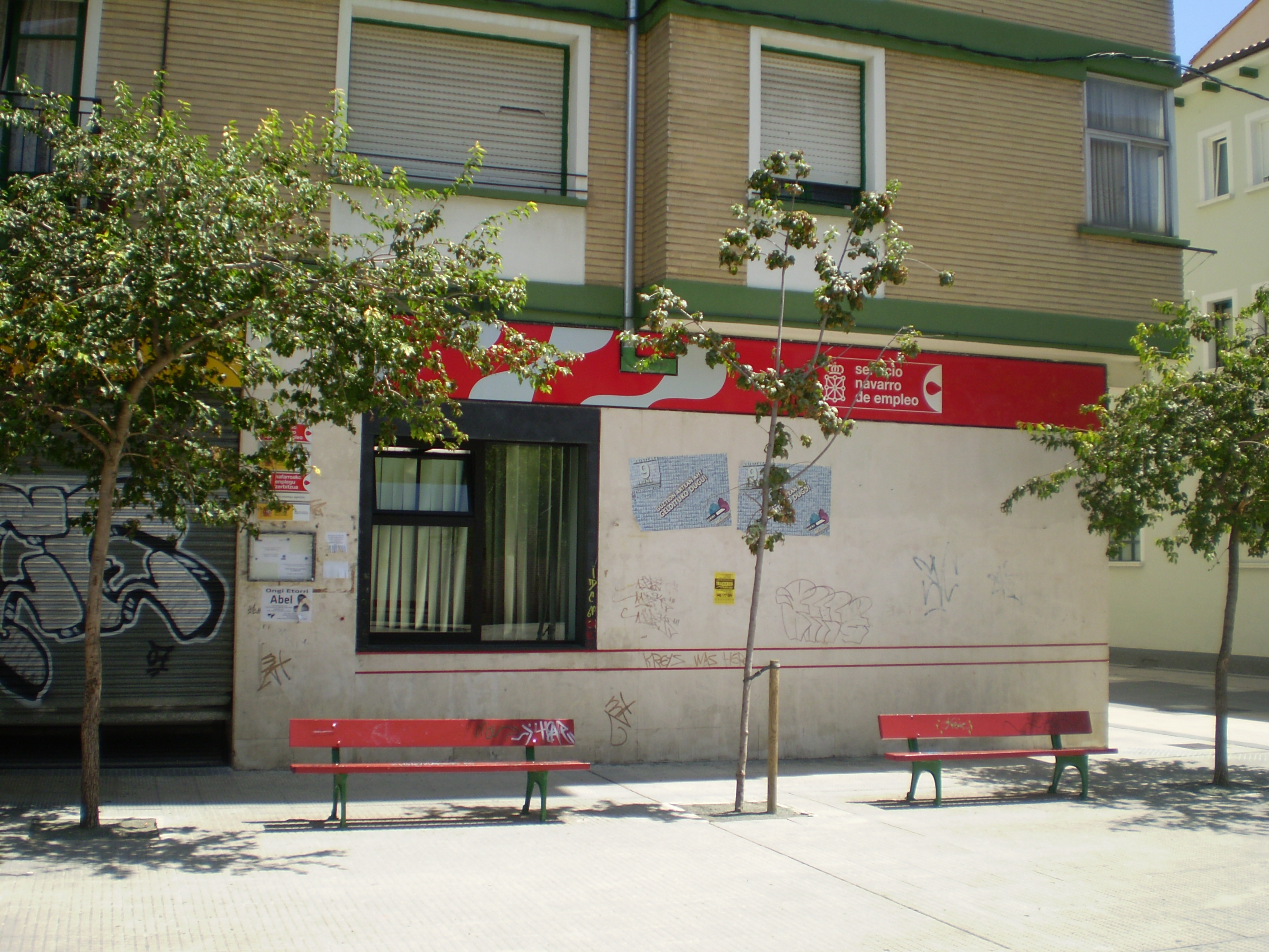 Oficinadel INEM y del Servicio Navarro de Empleo de la Rochapea Pamplona, Navarra, España